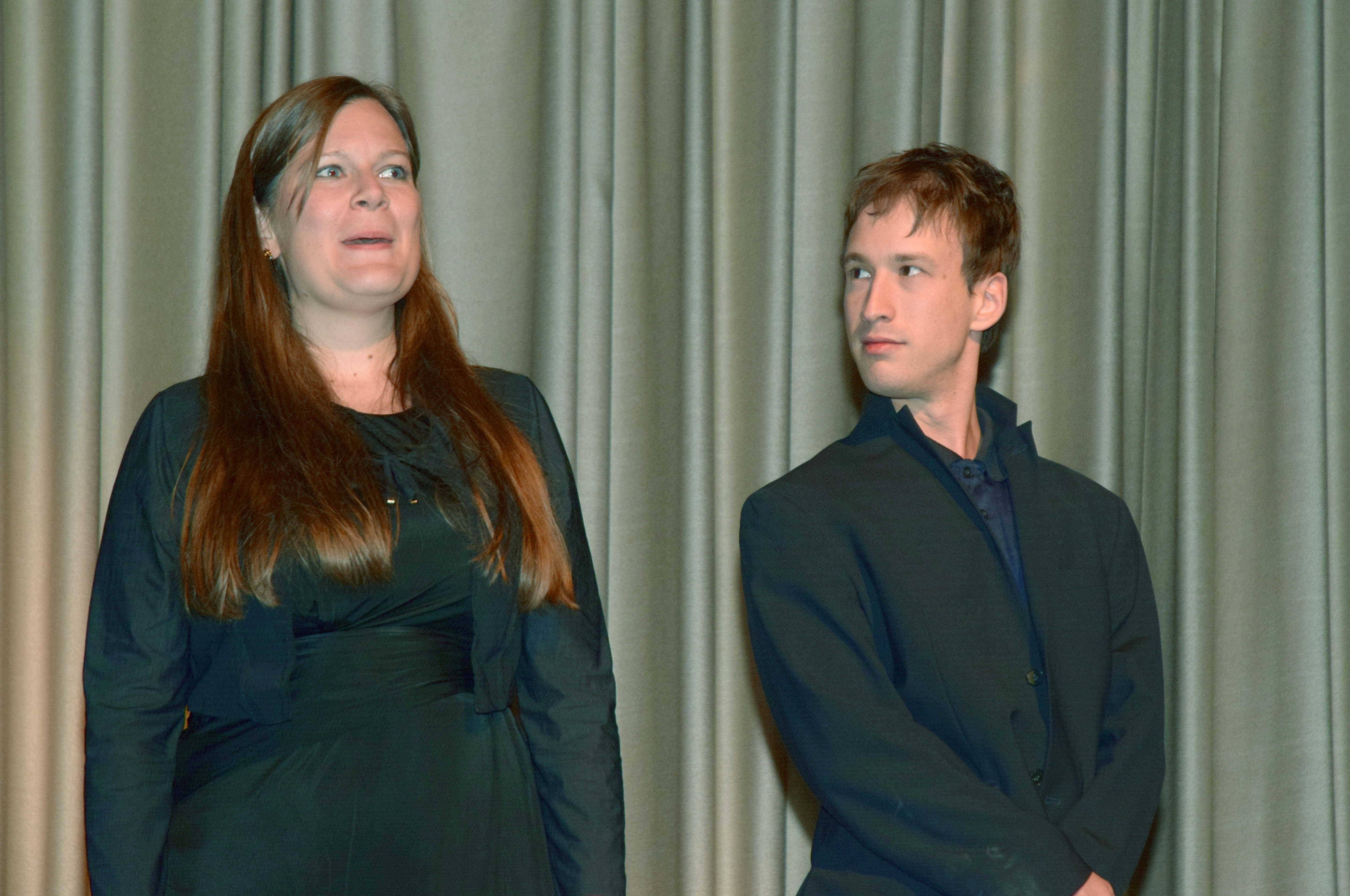 Barbara Marie-Louise Pavelka mit dem Pianisten Valentin Lazar bei der Voreröffnung des neuen Bildungs- und Veranstaltungszentrums in Neulengbach/Niederösterreich am 8. Juni 2017